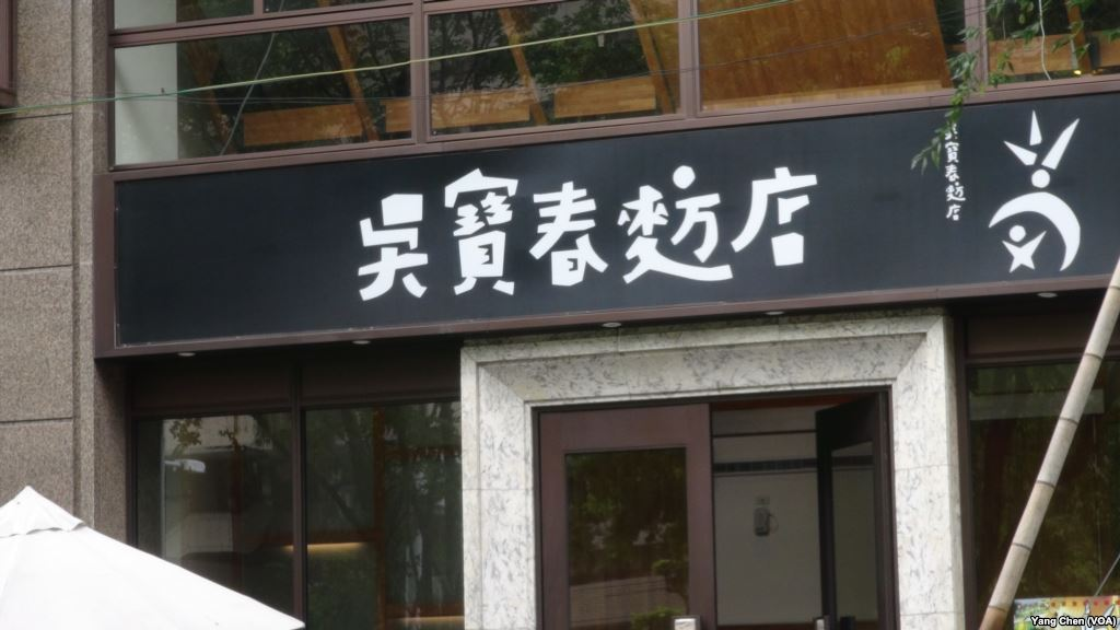 吳寶春麵包店。